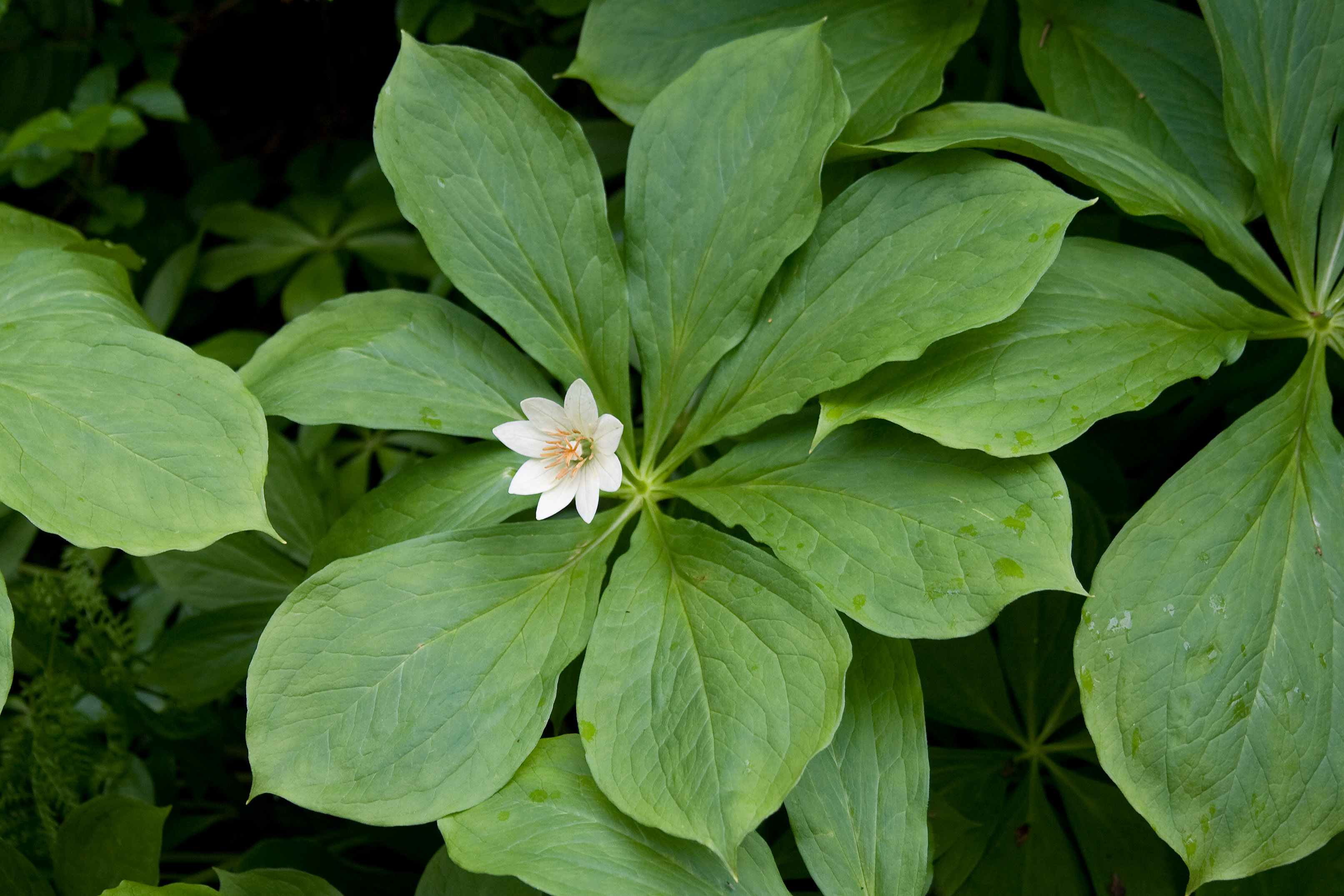 キヌガサソウ (学名:Paris japonica)